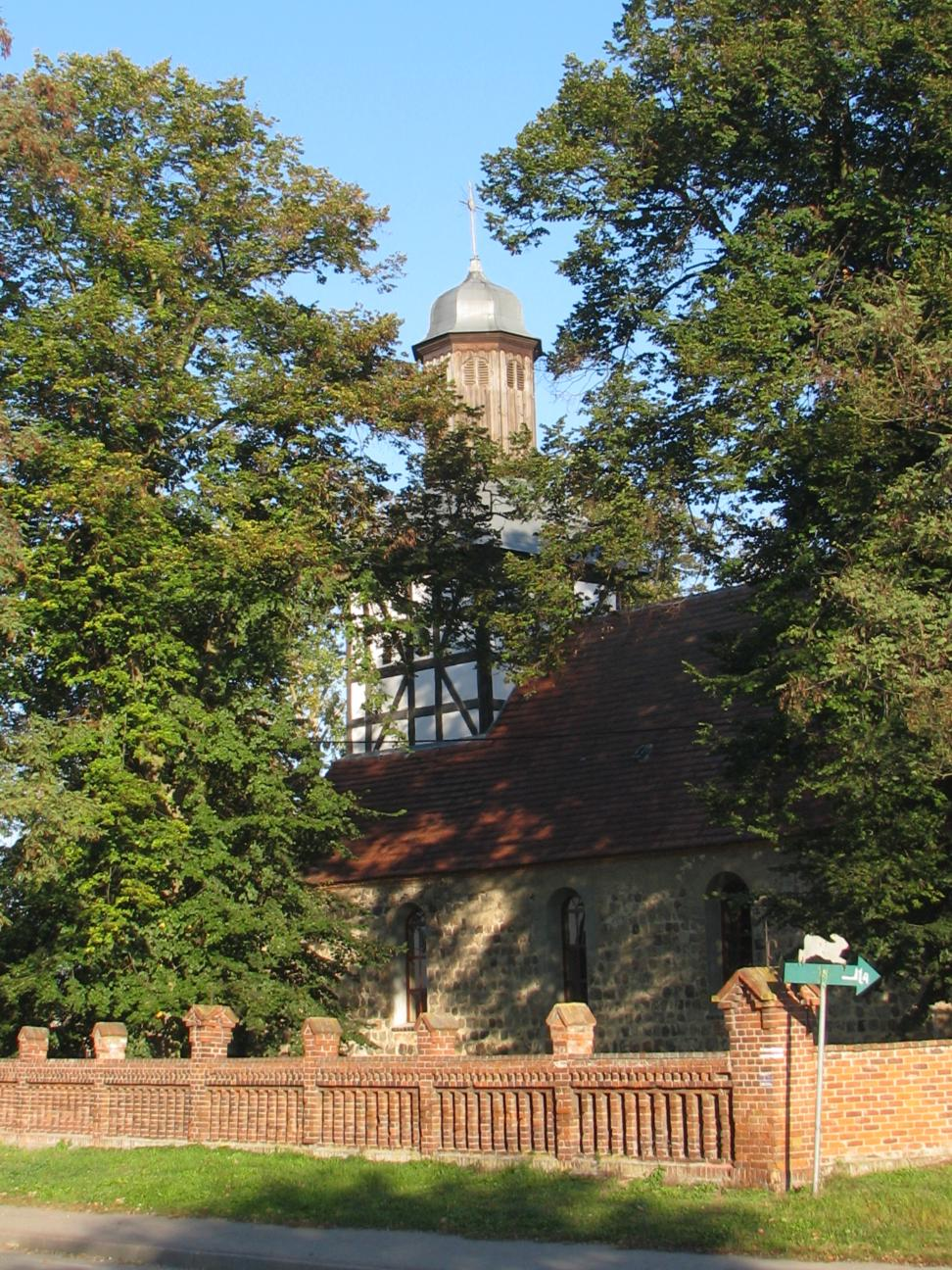 Kościół w Wojcieszycach. Widok od południowego wschodu.